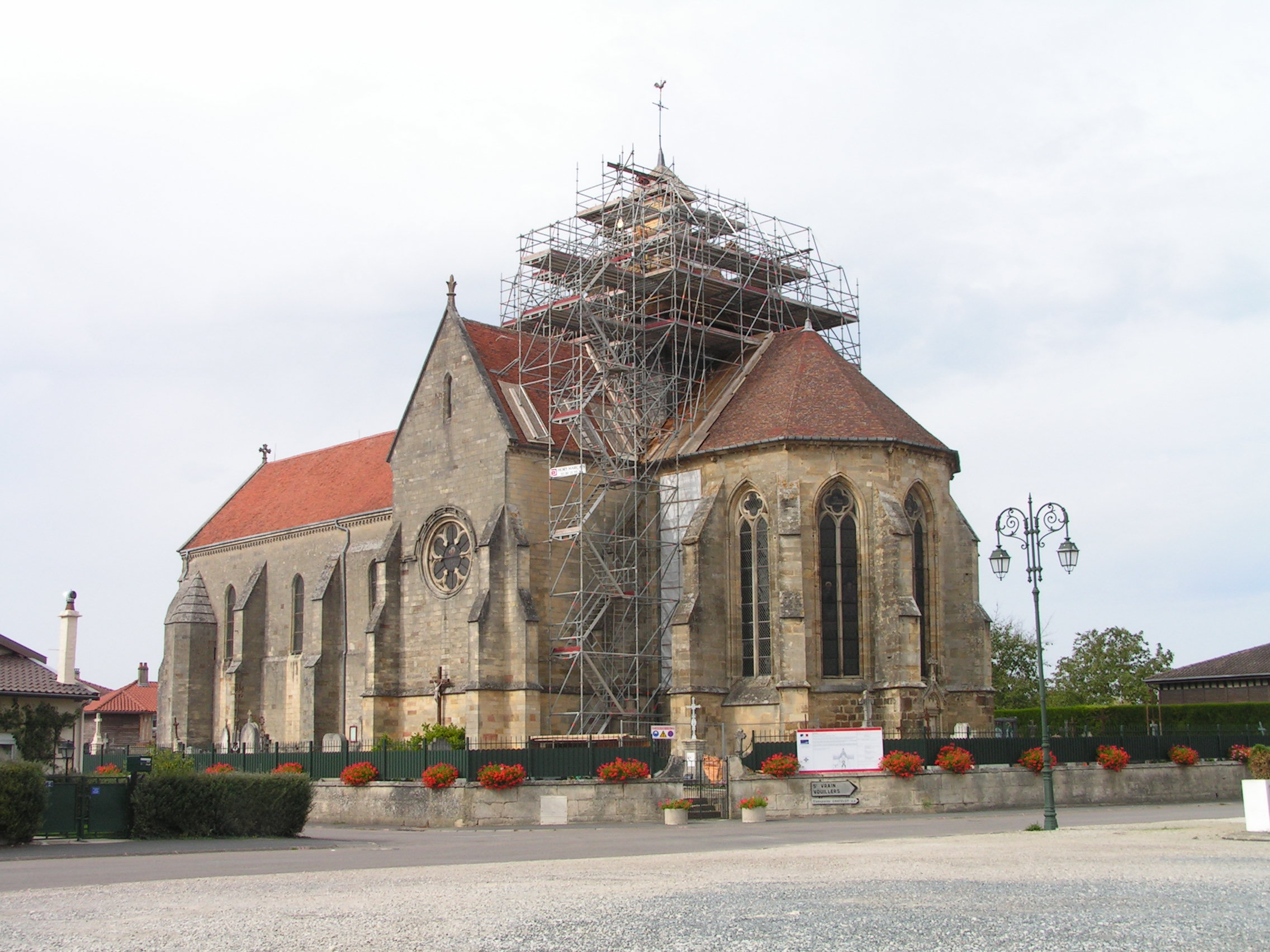 Église Saint-Sébastien de Perthes (Classé) .